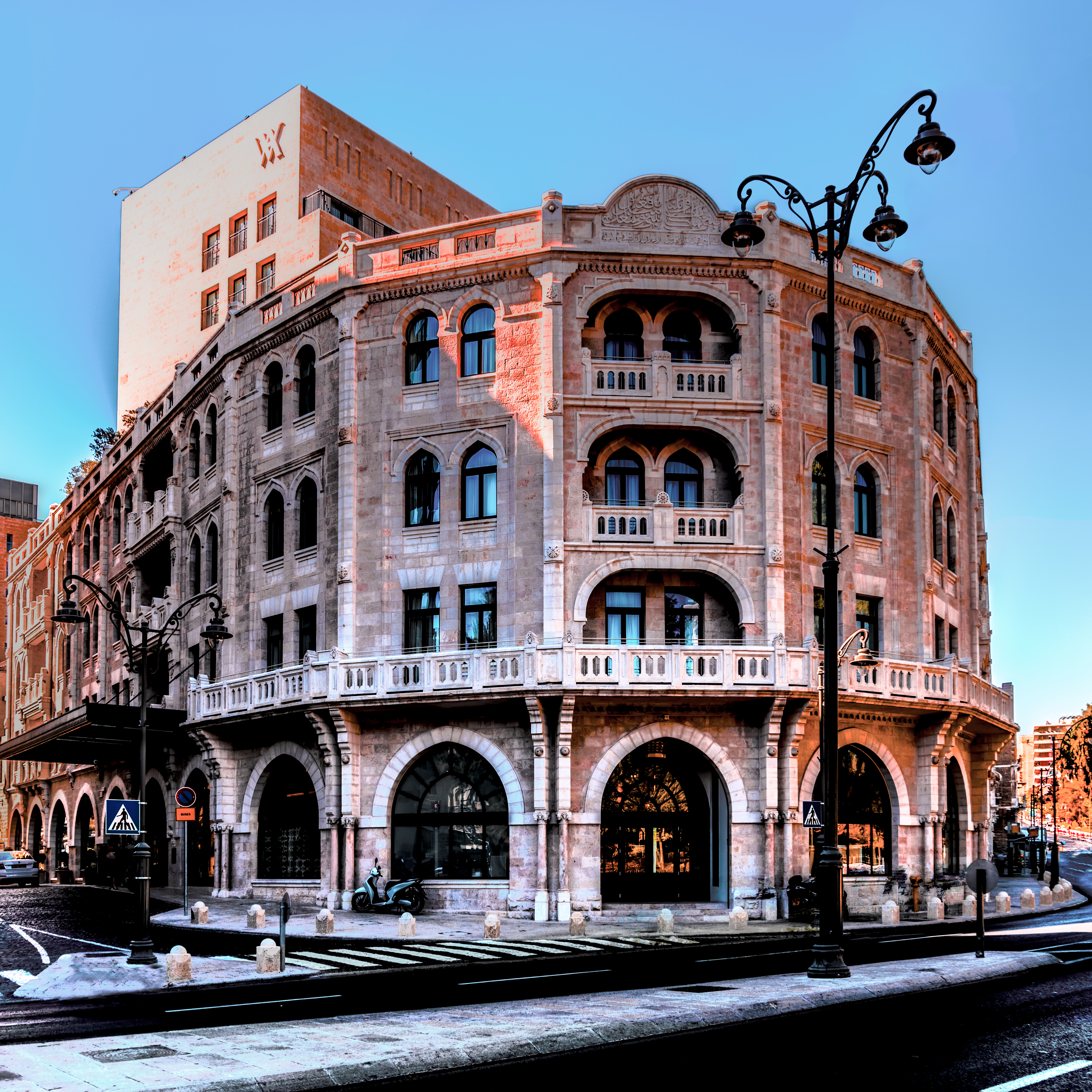 מלון פאלאס הוא בניין בפינת הרחובות אגרון ודוד בן שמעון. פעל כמלון פאר בשנותיו הראשונות, ולאחר מכן הוסב לבניין משרדים. בתחילת המאה ה-21 נבנה במקום מלון וולדורף אסטוריה ירושלים. למלון היו ארבע קומות, ובקומת הקרקע קשתות רחבות. המבנה מעוטר בגילופי אבן בסגנון ממלוכי, הדומה לגילופי האבן של חומות העיר העתיקה.